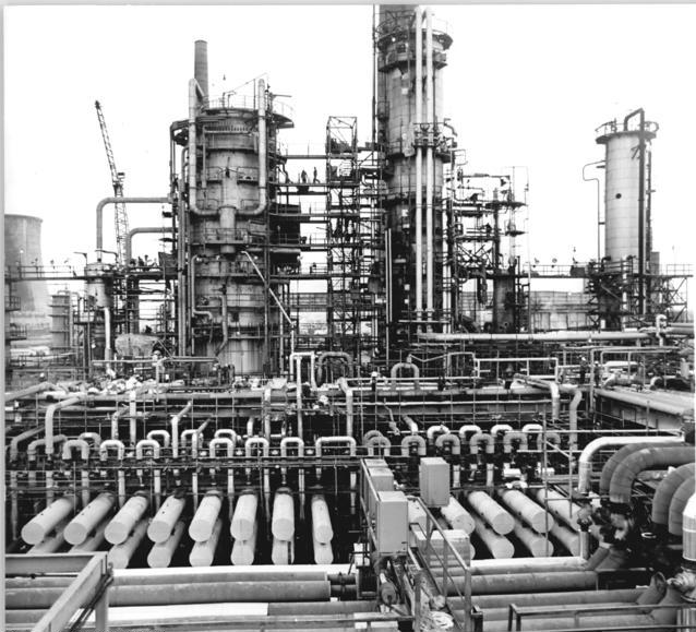 ADN-ZB-Müller Zü-Schr. 10.12.1975 Bez. Frankfurt-Oder Die Rohöldestillationsanlage II im PCK Schwedt.